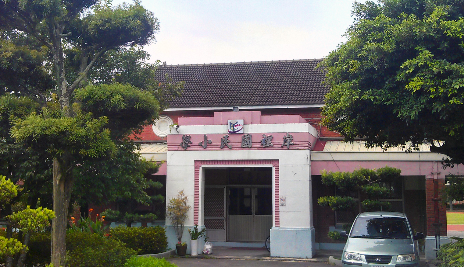 中文（台灣）: 神岡岸裡國小